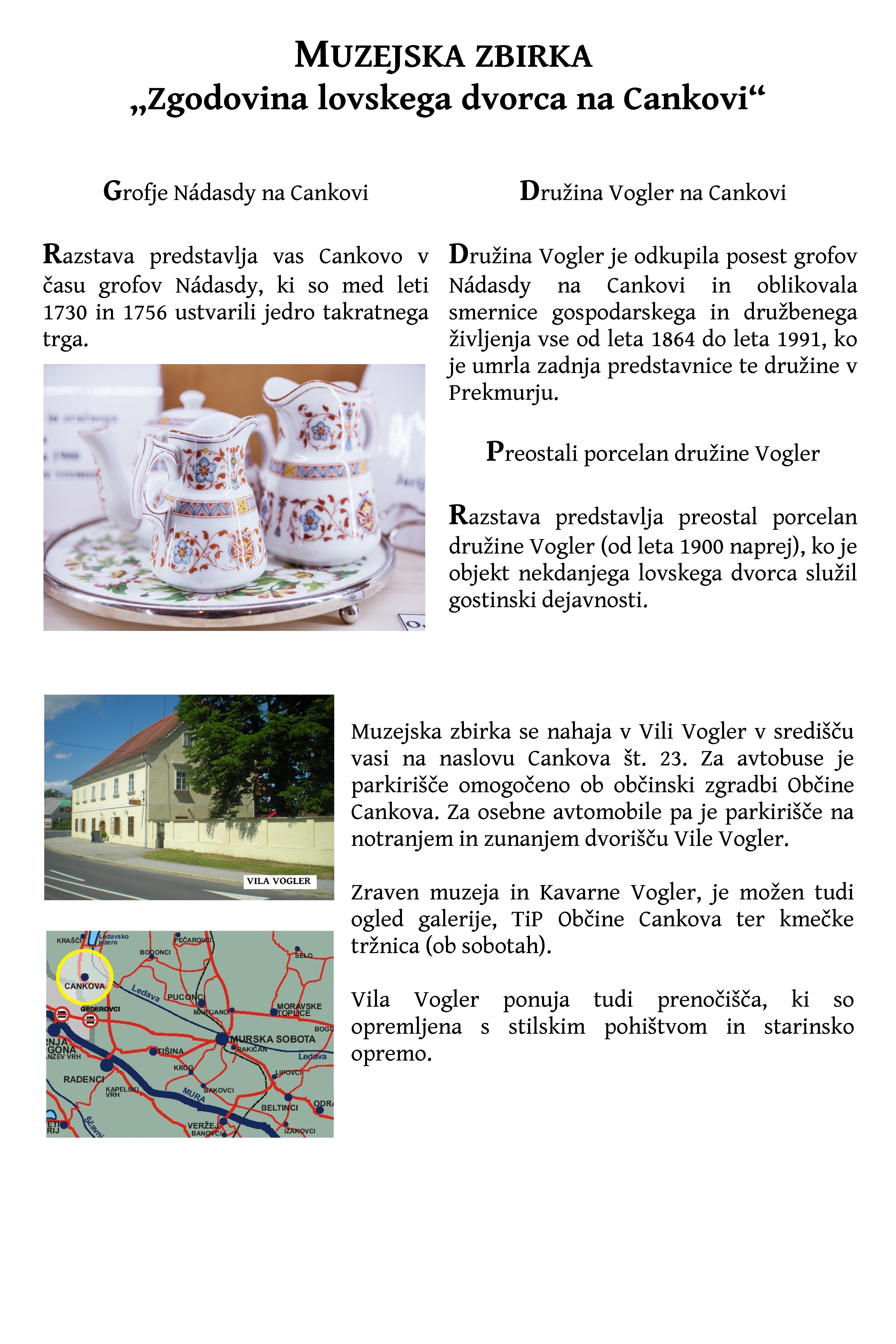 Muzejska zbirka na Cankovi